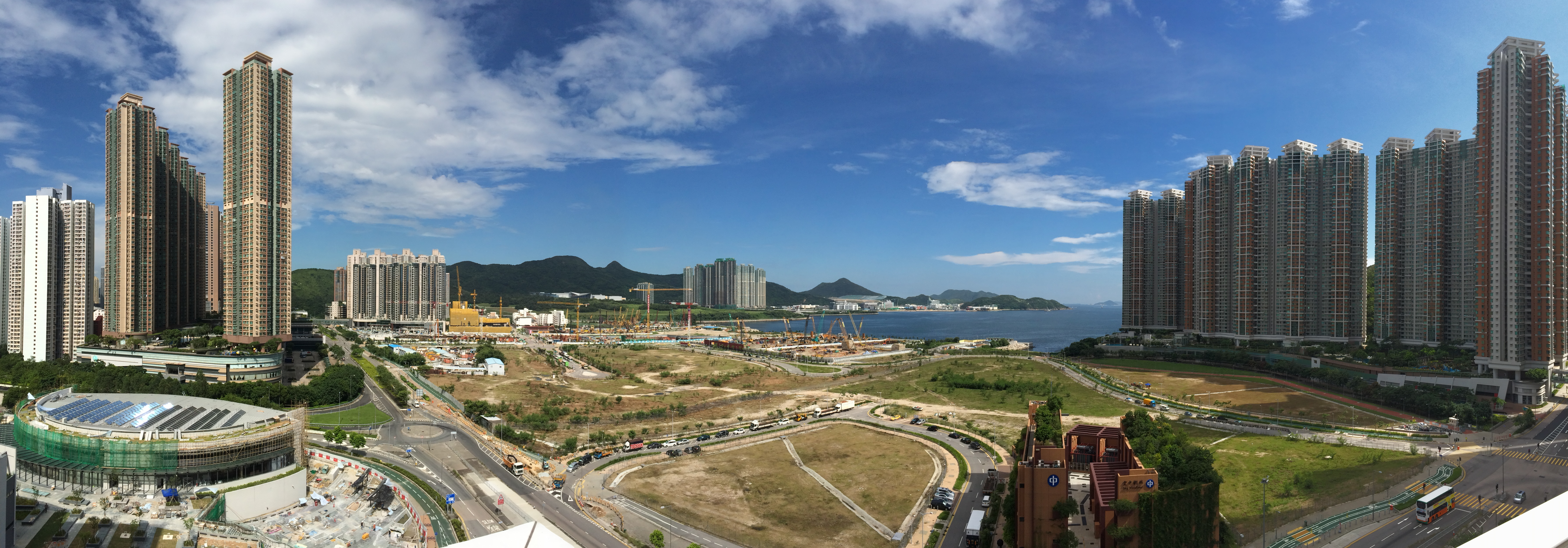 Tseung Kwan O South Pano